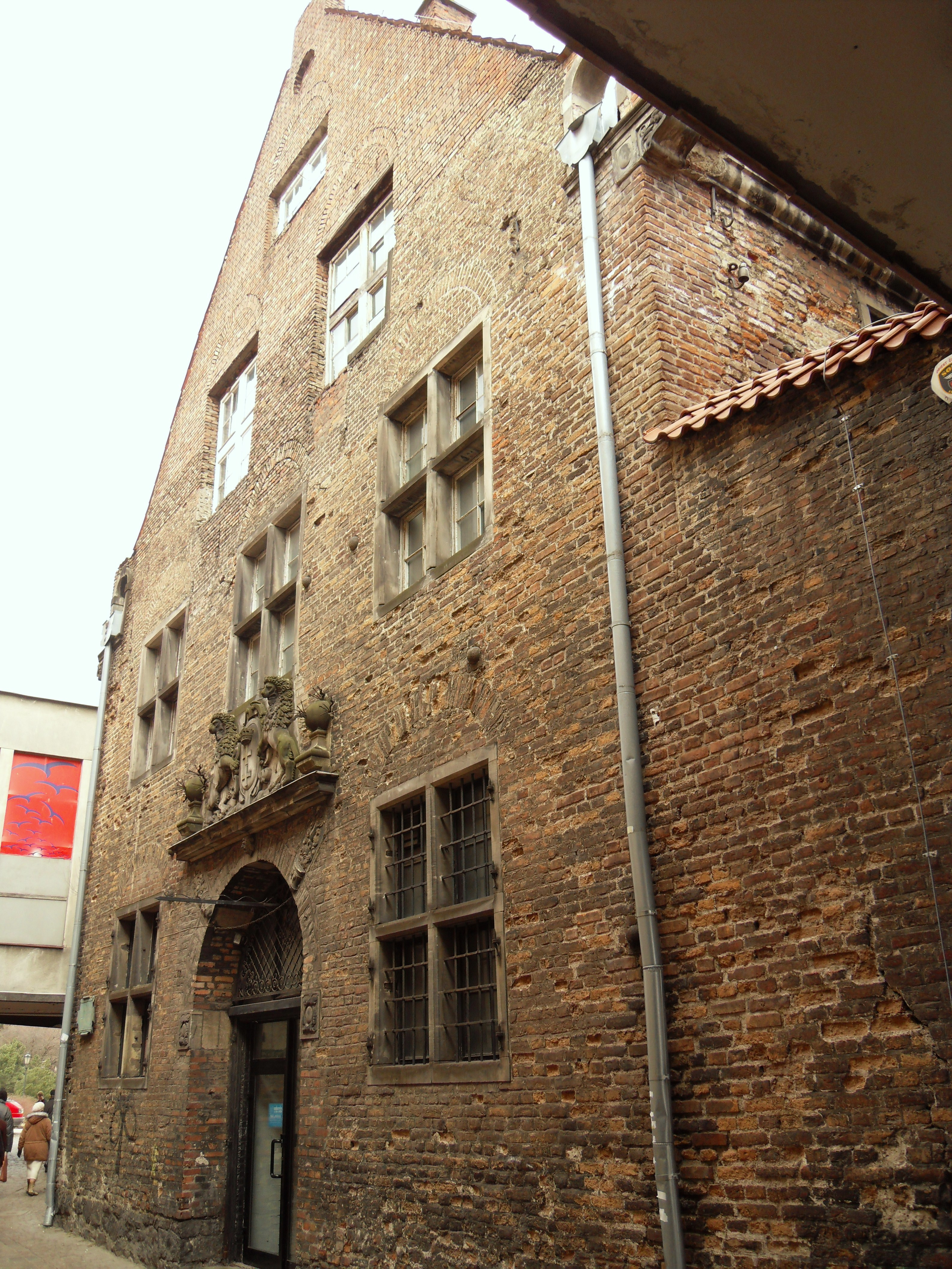 Gdańsk Główne Miasto - ul. Teatralna, Stara Apteka z XVII wieku.